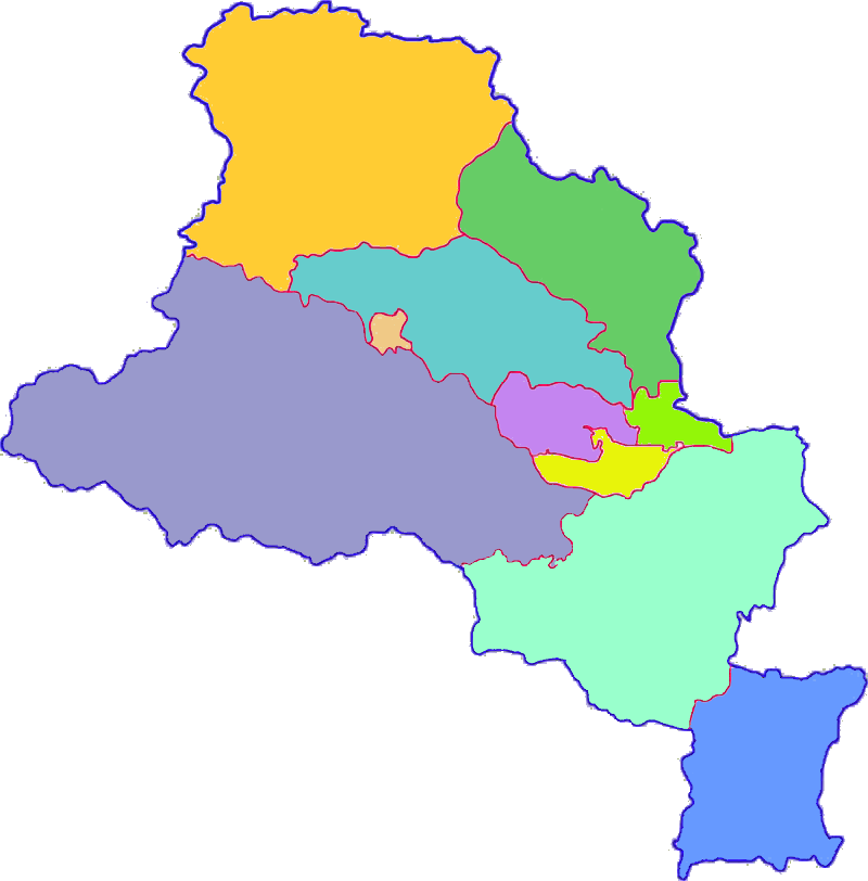 中文（中国大陆）: 平顶山地图